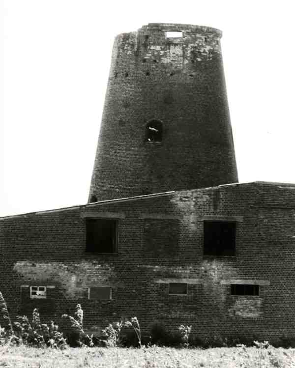 Essen Bergsebaan 25